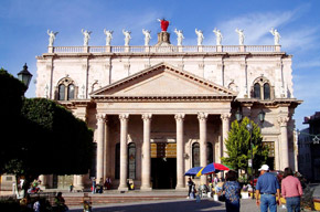 Iglesia del sagrado corazon